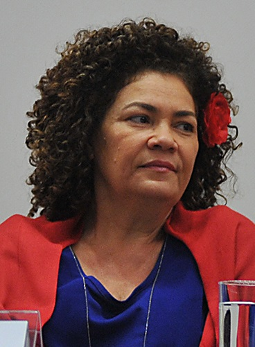 Perpétua Almeida em maio de 2014.